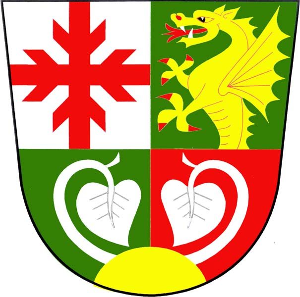 Znak obce Chlum (okres Česká Lípa)